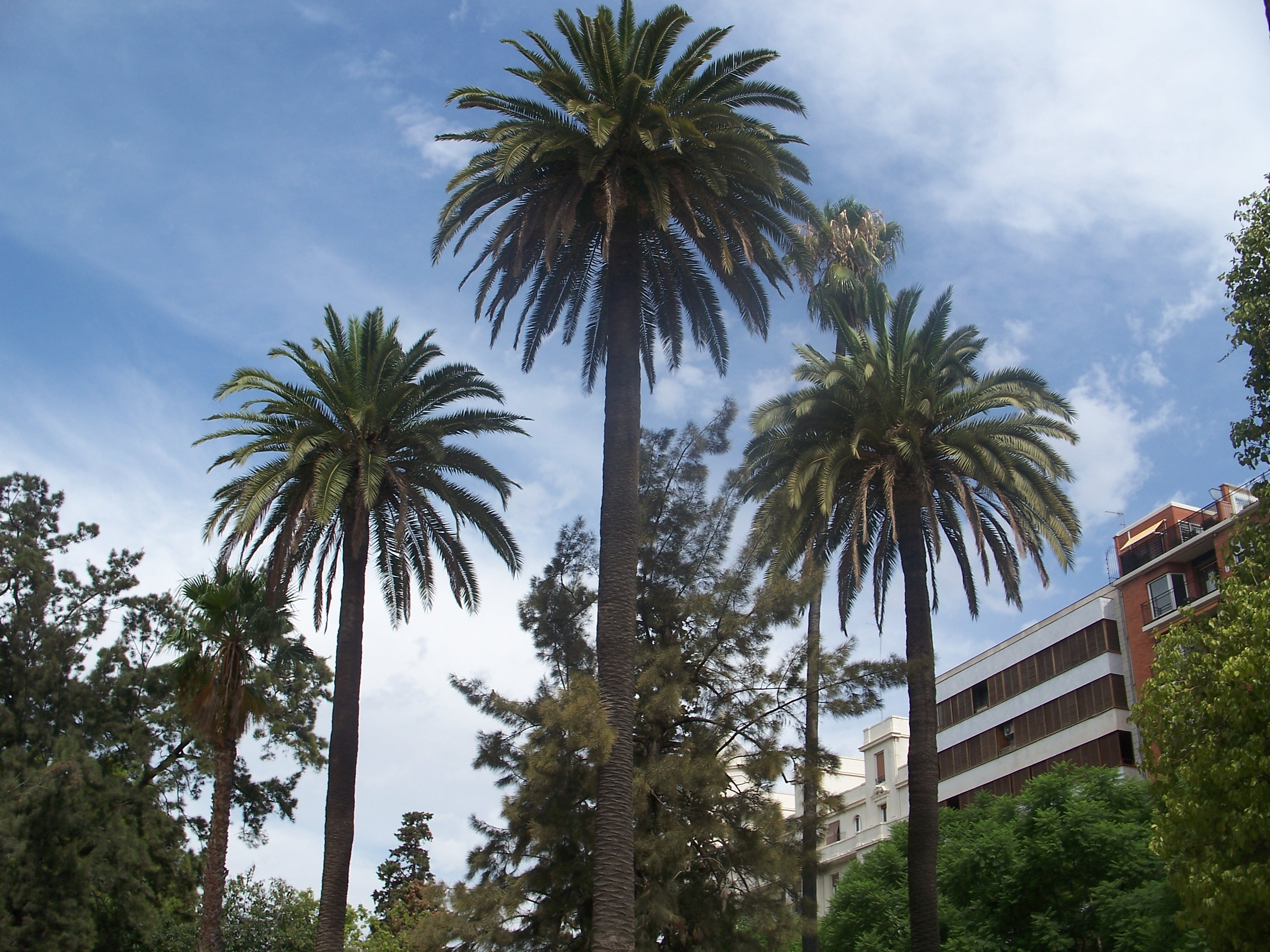 Palmeres_ciutat_de_València,_jardins_de_la_Glorieta